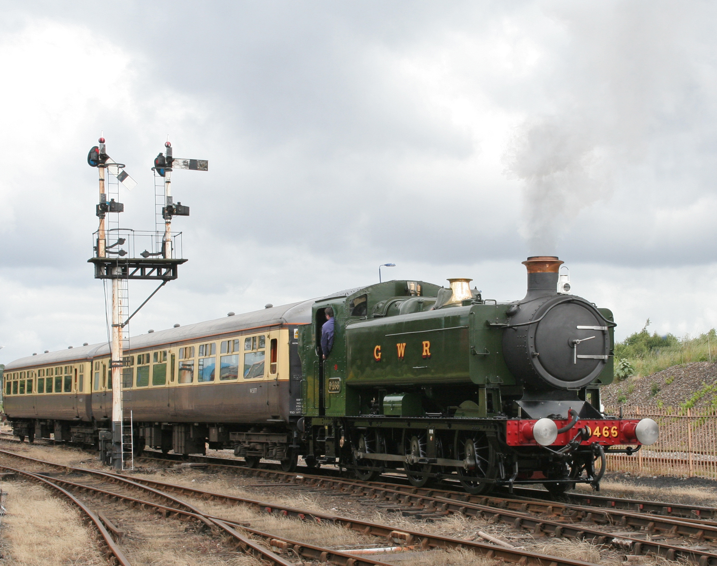 94XX Pannier Tank Engine 9466